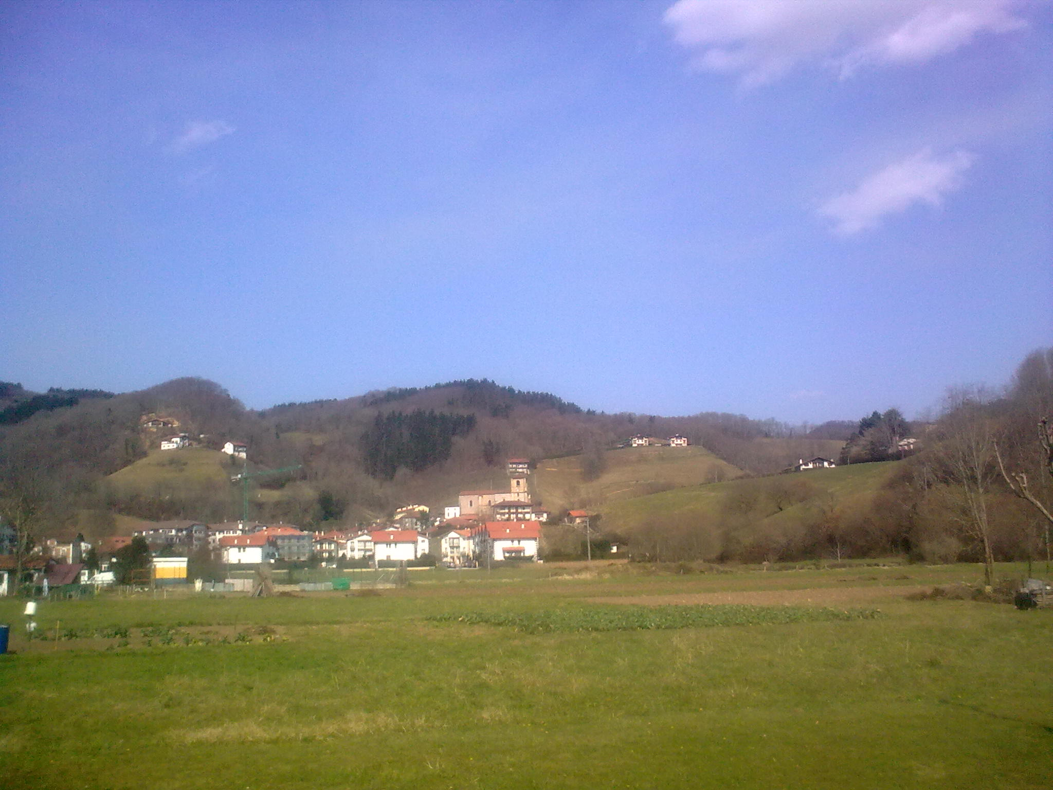 Berako (Nafarroa) elizaren inguruak, hegoaldetik ikusita